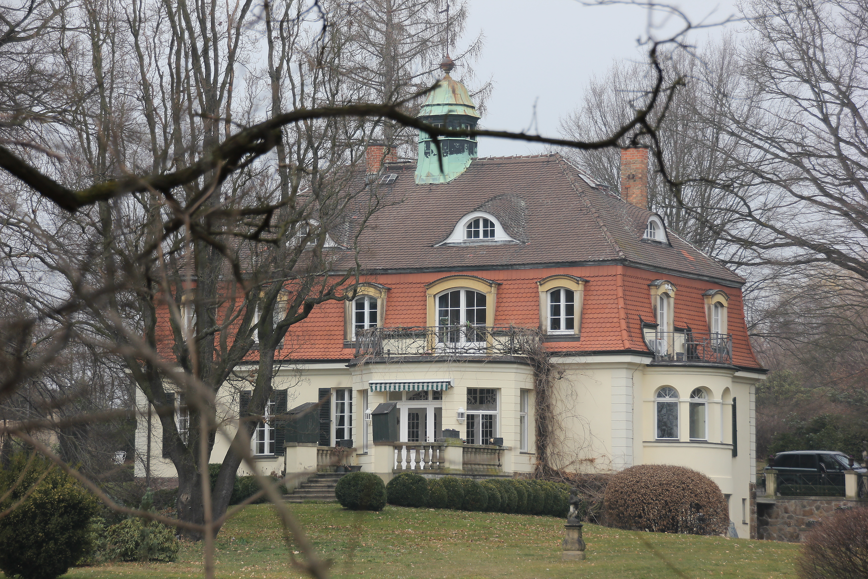 Villa Trautzschenhof